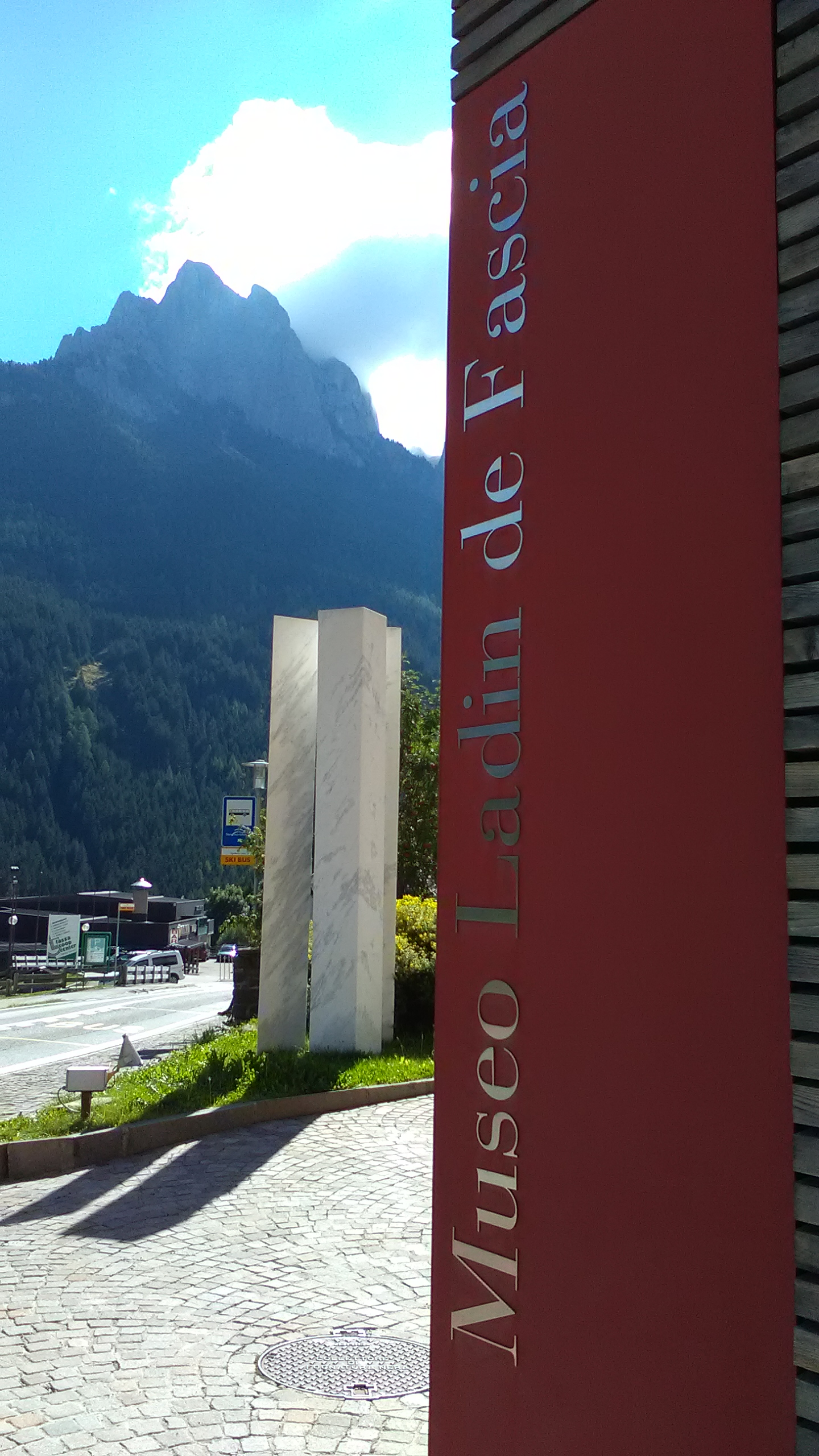 Insegna del Museo Ladino di Fassa (Museo Ladin de Fascia) a Vigo di Fassa (Trento)